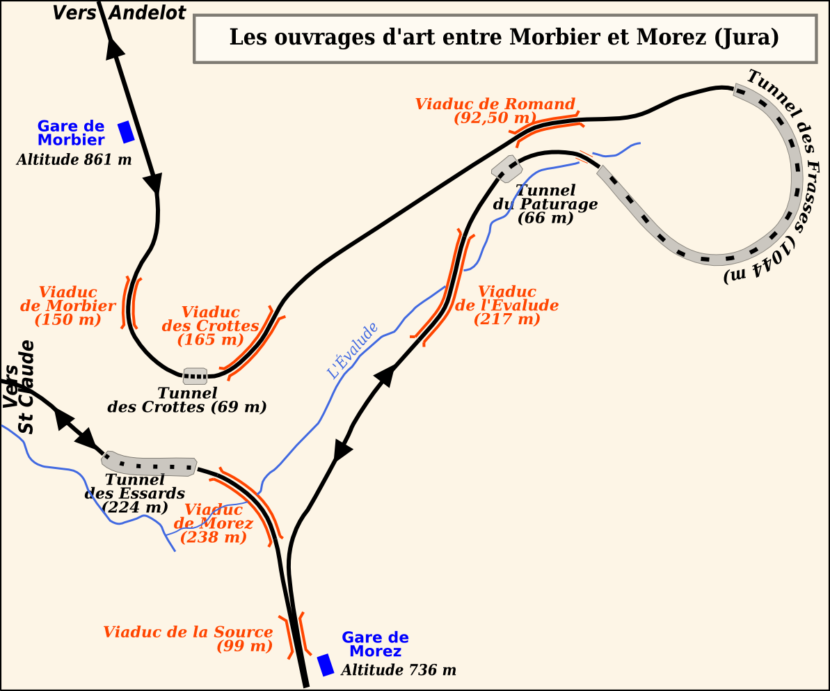 Gare de Morez. Tracé des viaducs de la ligne Ligne Andelot-en-Montagne - La Cluse (Depuis la Gare de Morbier jusqu'au tunnel des Essarts (Section de ligne Morez—Saint-Claude)